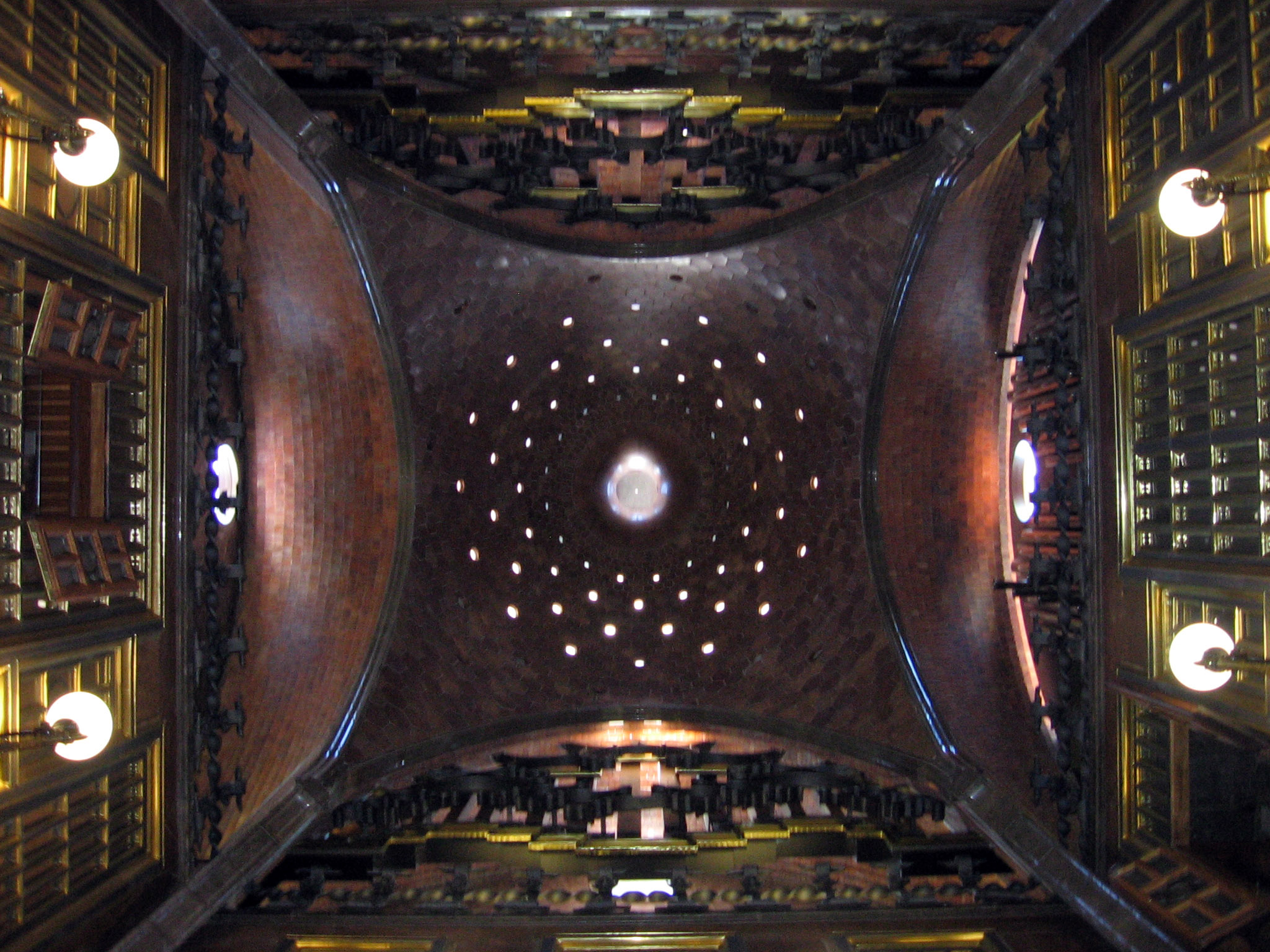 Cúpula del Palacio Güell.